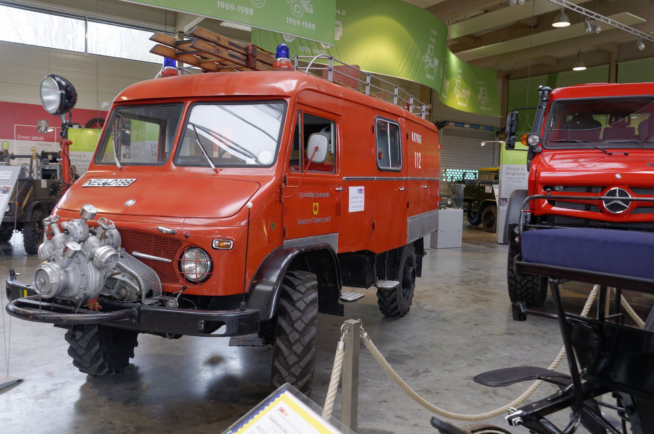 Gaggenau -Unimog-Museum